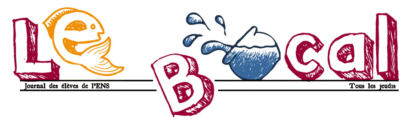 BOcali imago